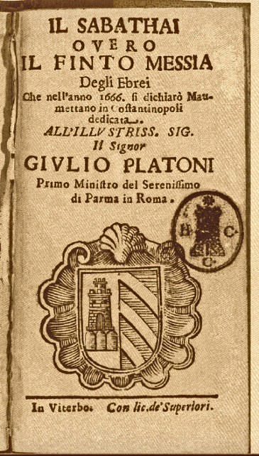 Dedicatoria dentro del libro "Il Sabathai overo il finto Messia degli Ebrei" que fue obsequiado y dedicado al Ilustrísimo Señor Giulio Platoni, Primer Ministro del Serenísimo de Parma datado en el año 1666 por el autor Carlo Alfani y la imprenta de Pietro Martinelli. El homenaje contiene el escudo de armas de la familia Platoni. El libro se publicó en Viterbo en el año 1669 y se refiere a la biografía italiana de Sabbatai Zevi, (Shabtai Tzvi) el rabino judío que afirmó ser el mesías.